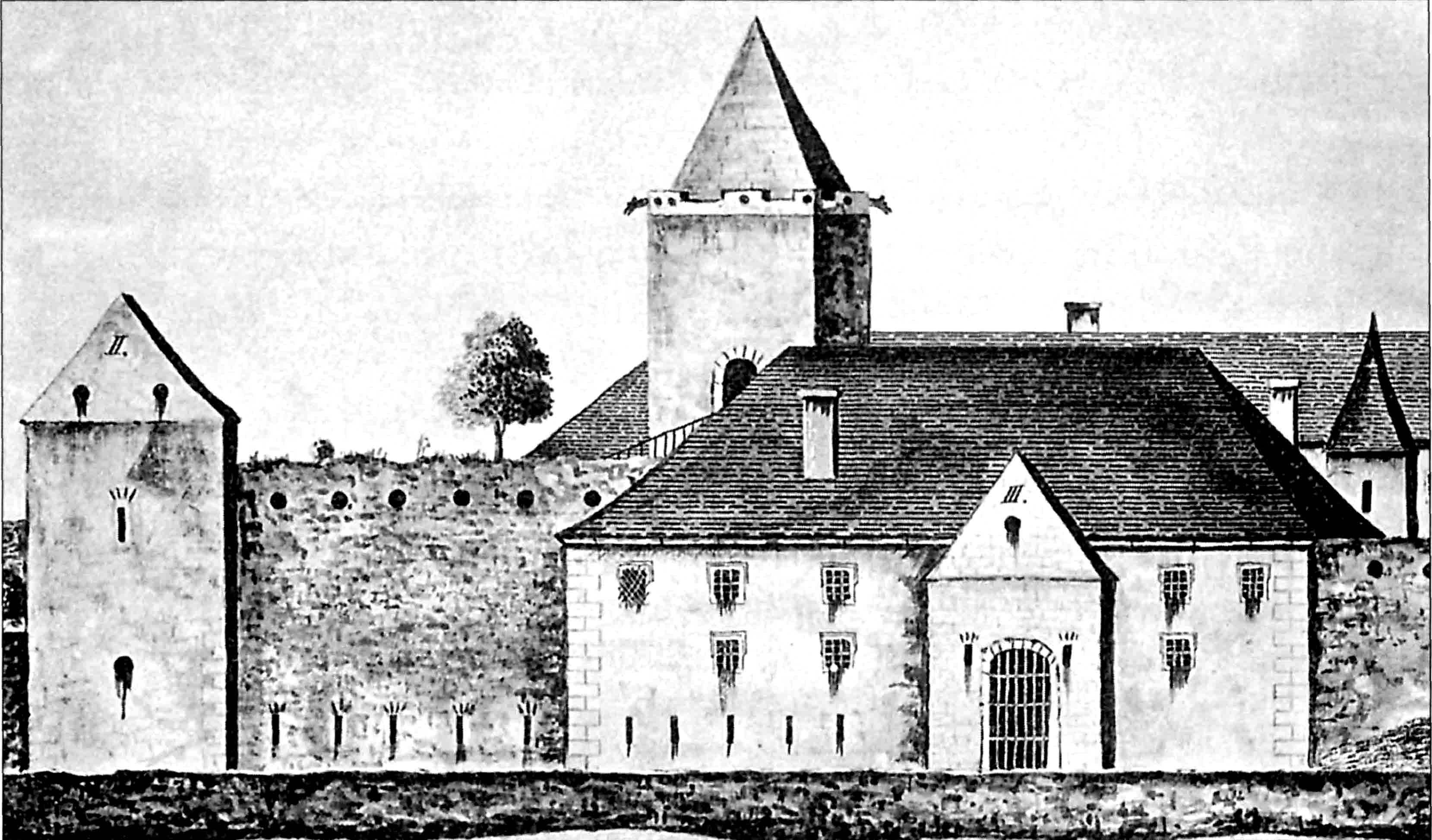 Schloss Großenhain vor 1642 nach Federzeichnung Dillig, Promenadenseite